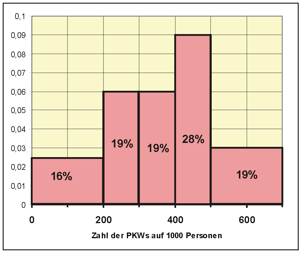 Beispill vun engem Histogramm